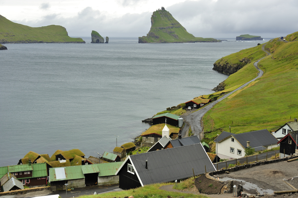 Der Tindhólmur wird aufgrund seiner Größe nicht zu den 18 Inseln der Färöer gezählt, sondern ist mit einer Fläche von 65 ha der größte der 11 Holme des Archipels (nur geringfügig kleiner als die Insel Lítla Dímun mit einer Fläche von 80 ha).